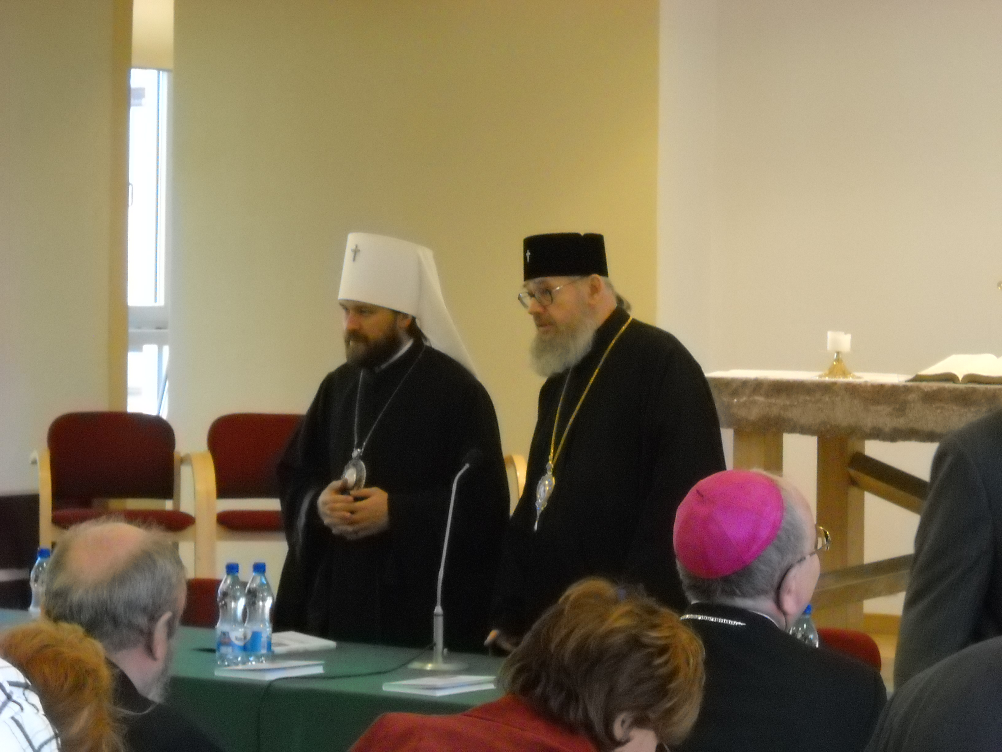 Metropolita wołokołamski Hilarion i arcybiskup wrocławski i szczeciński Jeremiasz